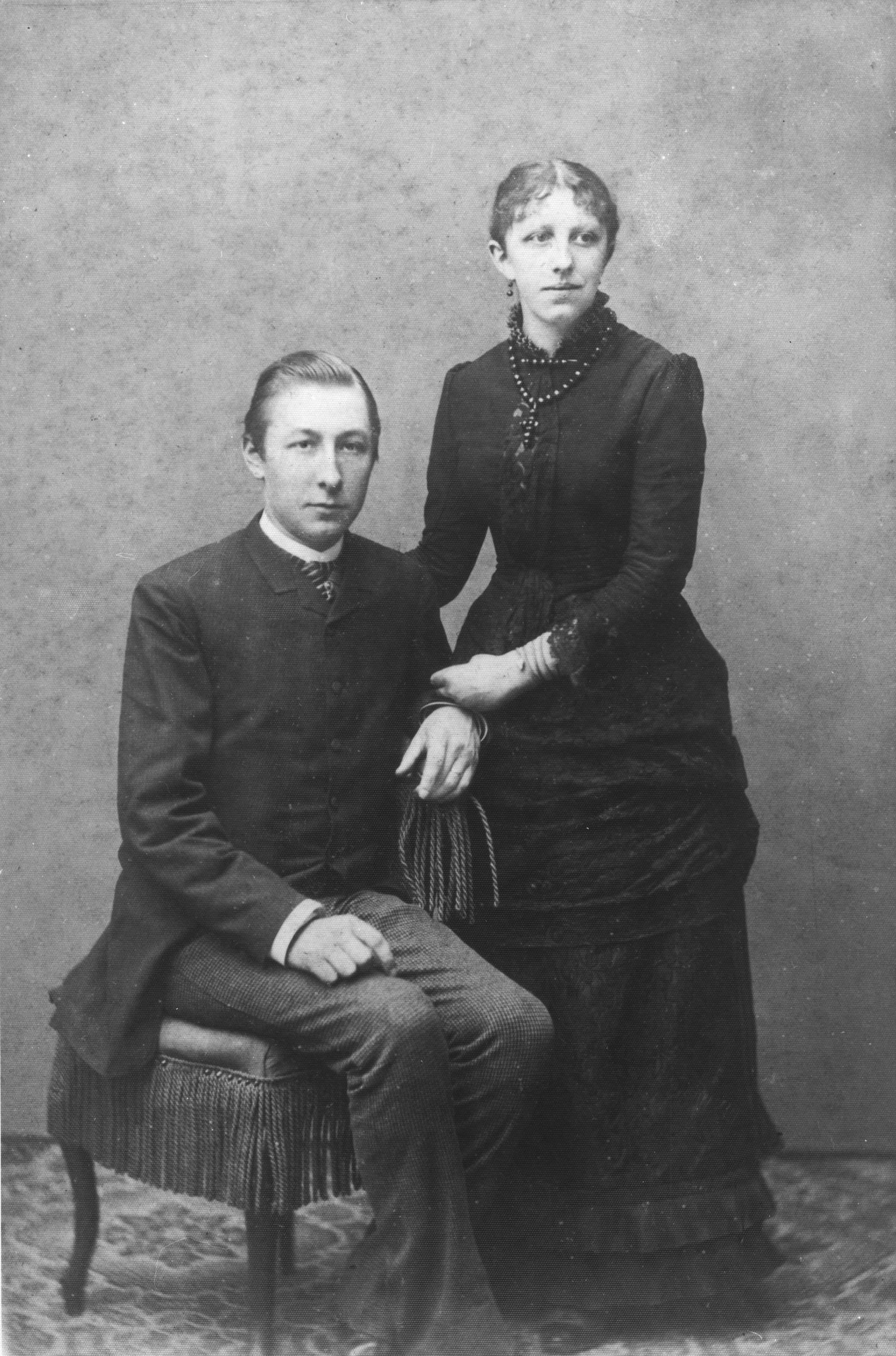 Pieter Jelles Troelstra mei syn oansteande Sjoukje Bokma de Boer (Nynke fan Hichtum)